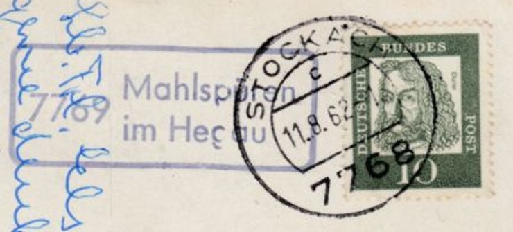 Deutschland (D) - Baden-Württemberg (BW) - Landkreis Konstanz (KN) - Stadt Stockach - Stadtteil Mahlspüren im Hegau: Posthilfstelle-Stempel "7769 Mahlspüren im Hegau"